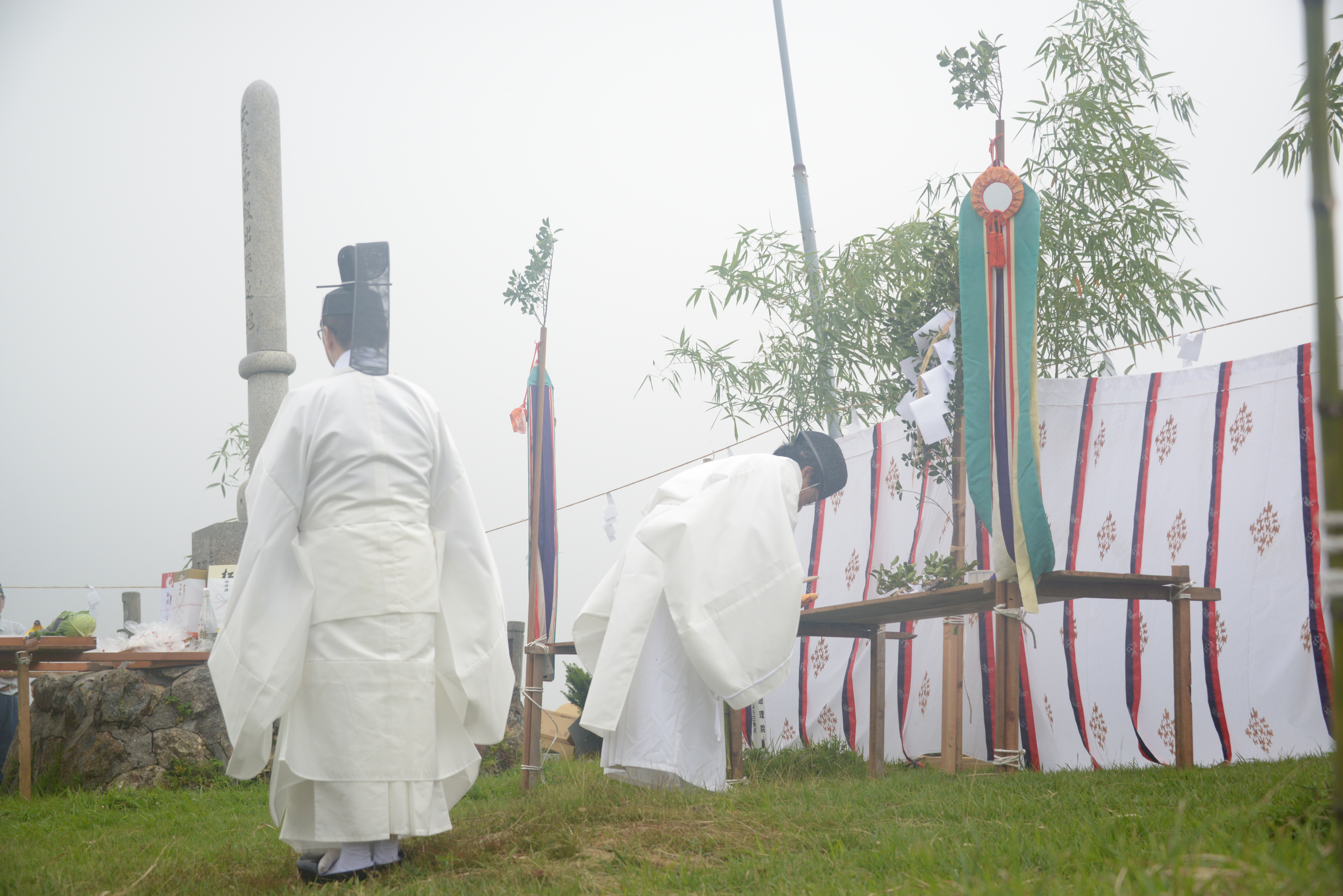 神職による祝詞